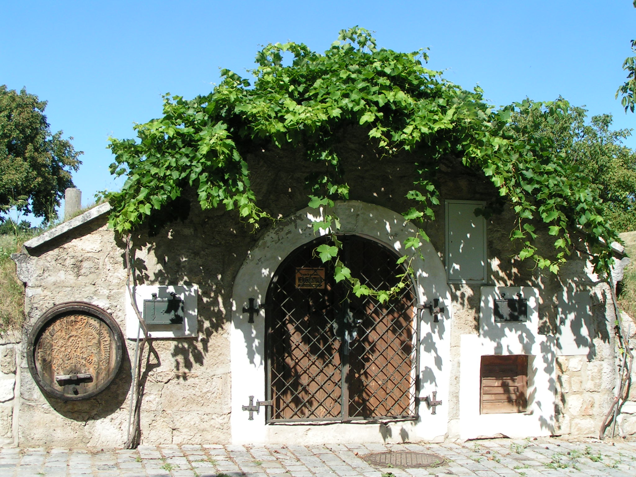 Kellergasse in Purbach